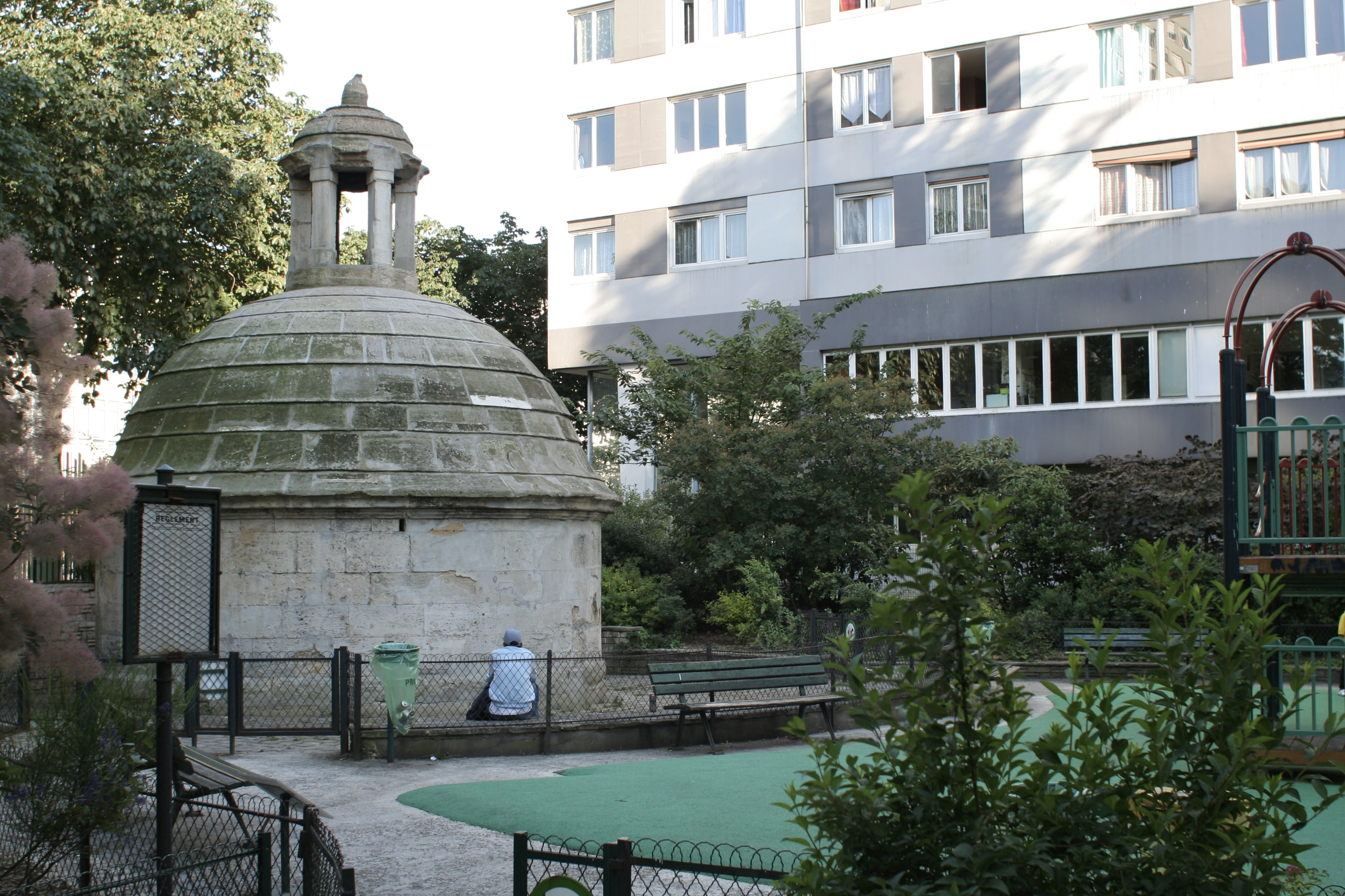 Regard de la Lanterne, dans le jardin du Regard-de-la-Lanterne, Paris 19e arrondissement.